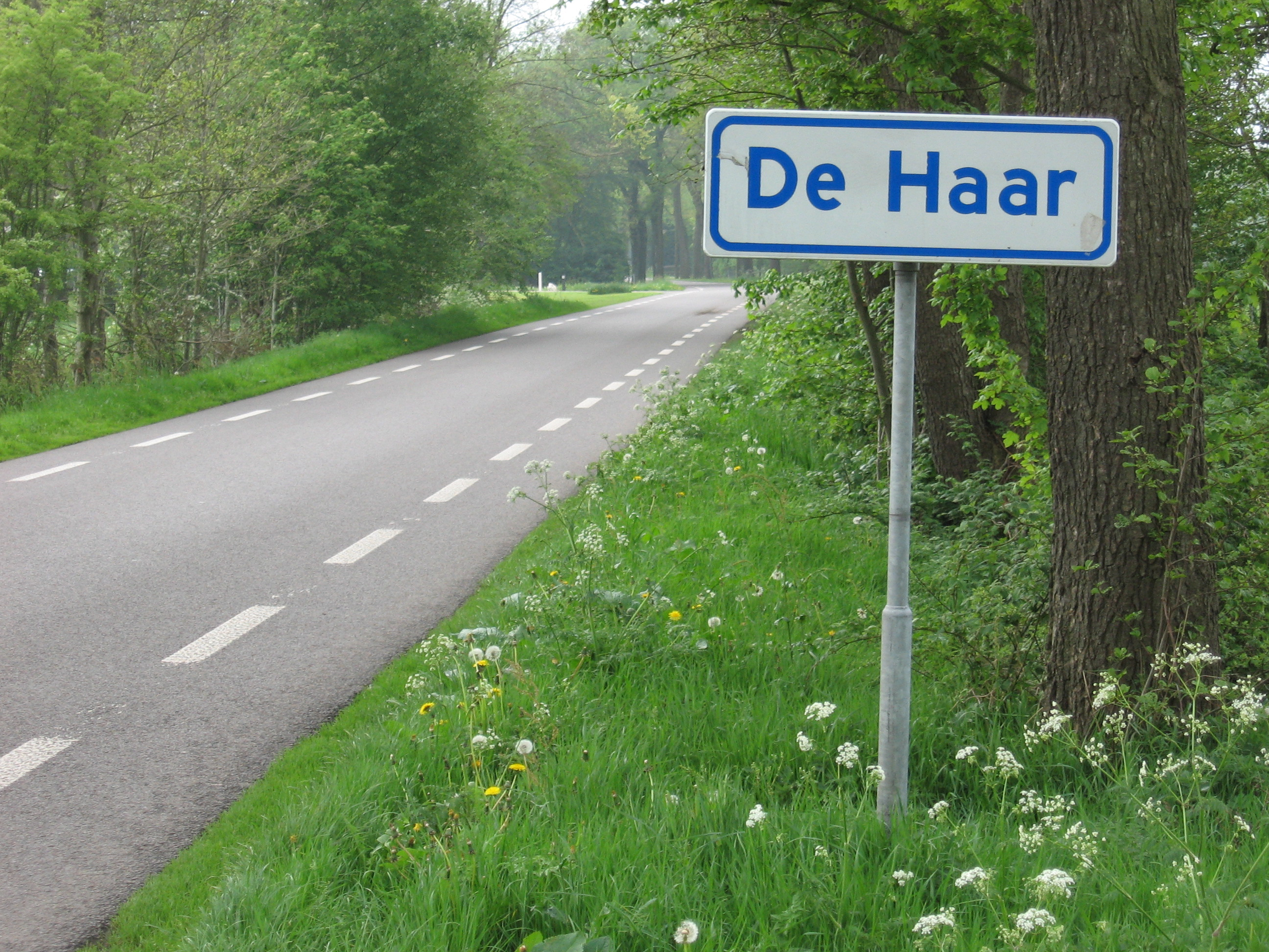 Road sign of De Haar in the municipality of Marum, the Netherlands